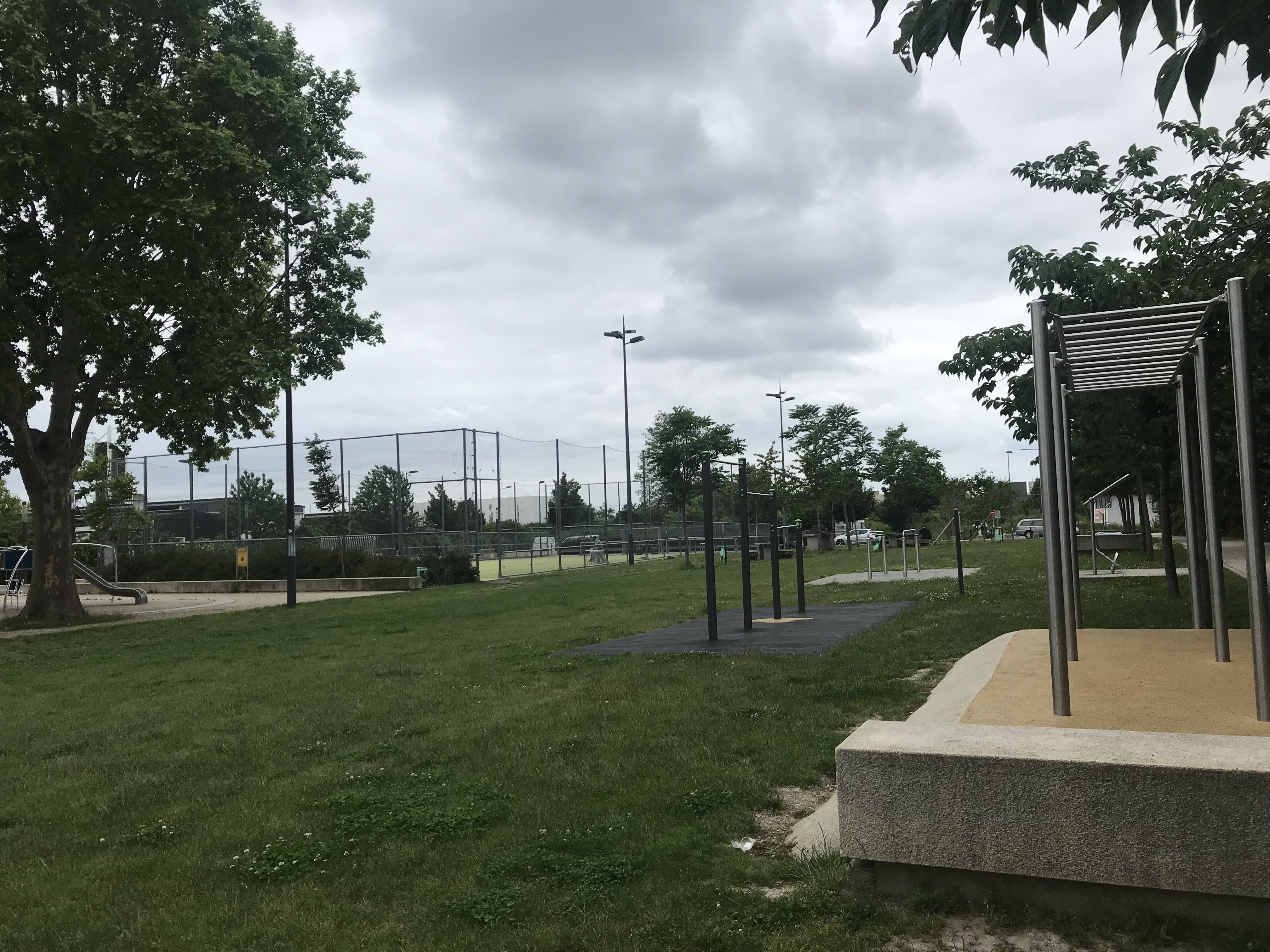 espace sportif de Stains (93)